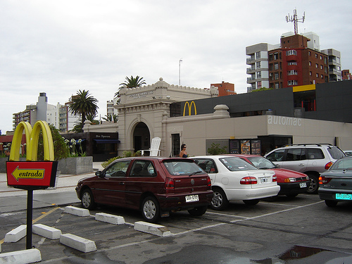 Restaurante de comida rápida Mc Donald's, en Montevideo (Uruguay).